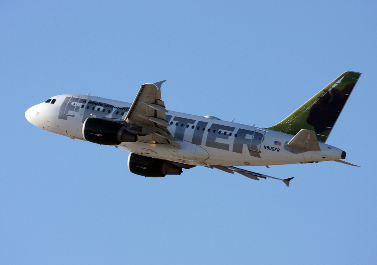 N806FR